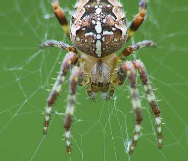 Kreuzspinne Info: Eschborn Herbst 2002 Canon 90IS